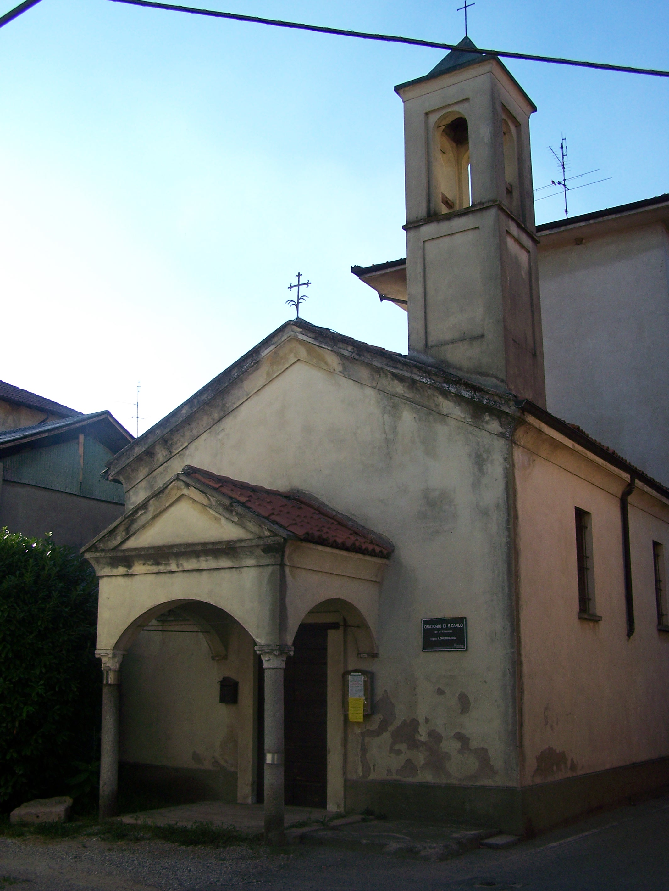 L'oratorio di San Carlo "vecchio" a Castellazzo de' Barzi, frazione di Robecco sul Naviglio (MI) - Italy